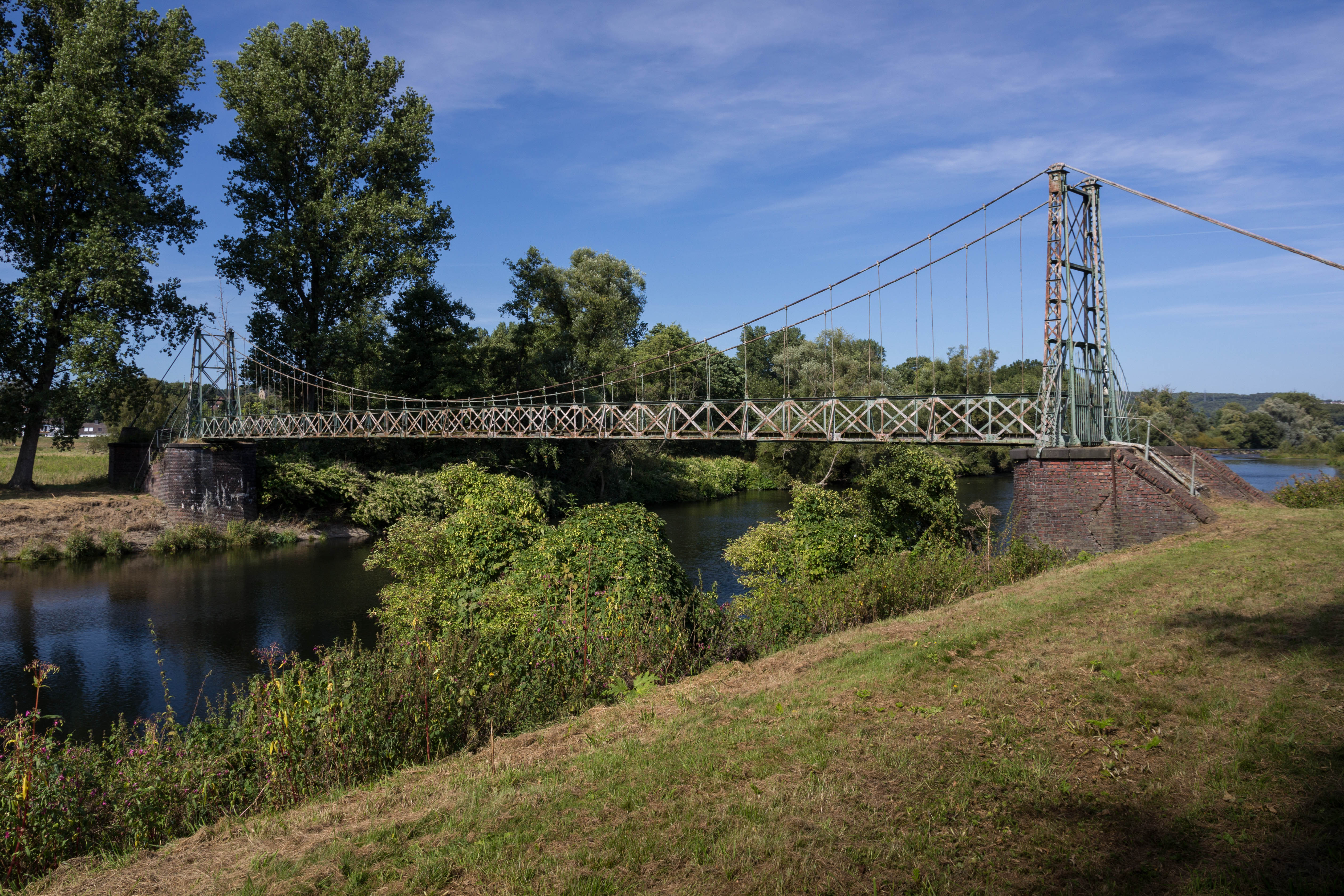 Seilhängebrücke am Kaltenborn über die Ruhr aus Eisen auf gemauerten Widerlagern, Spannweite 38 m, Baujahr 1893This is a photograph of an architectural monument.